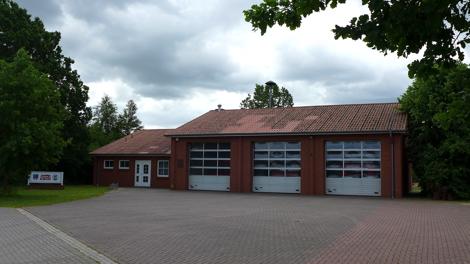 FFW Elsdorf im Landkreis Rotenburg (Wümme) gegründet in 1930. Ansicht von Gerätehaus und Gemeinschaftsraum in 2015-06.